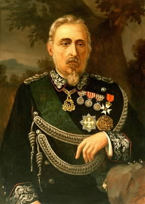 Ritratto del generale piemontese Giovanni Durando (1804-1869)